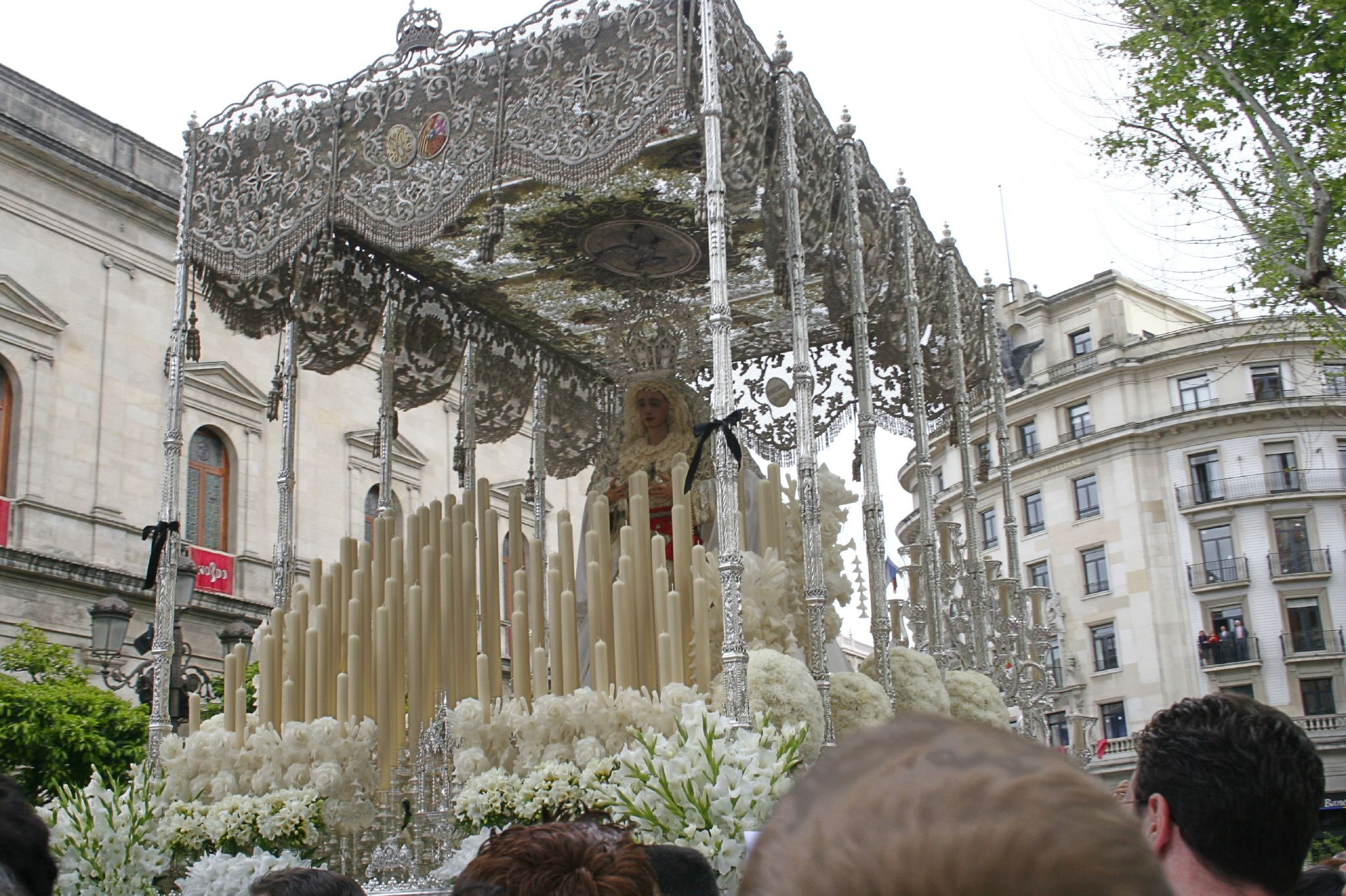 María Santísima de la Paz. Semana Santa en Sevilla. Año 2006 Foto realizada y propiedad de Ángel Chacón